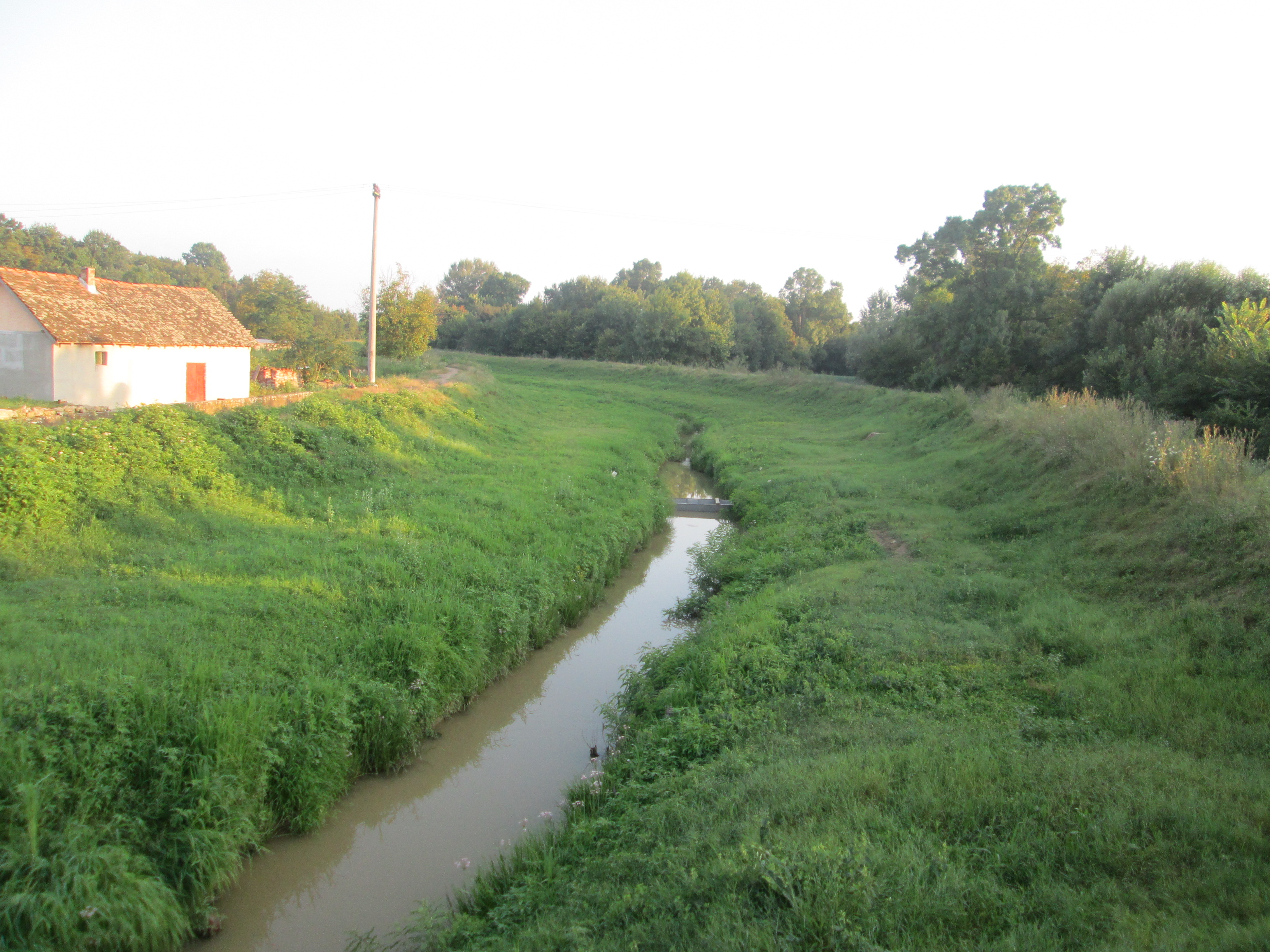 Српски (ћирилица): Река Думача близу Мишарског брда